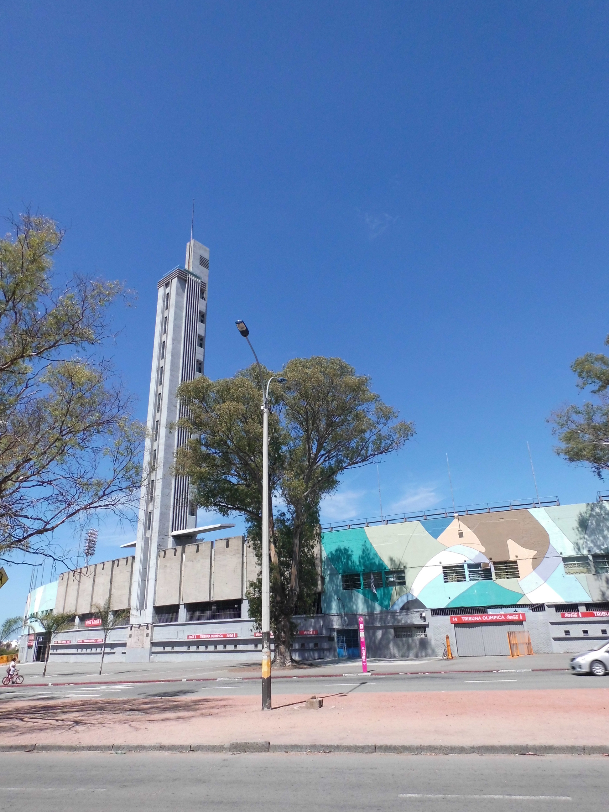 Vista exterior de la Tribuna Olímpica y la Torre de los Homenajes del Estadio Centenario